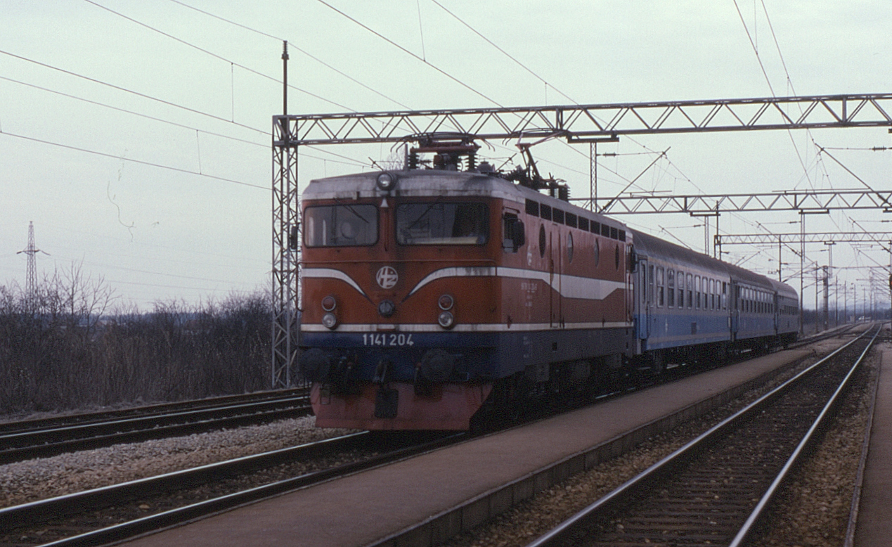 1141.204 at Nova Kapela-Batrina, 12 February 1997.